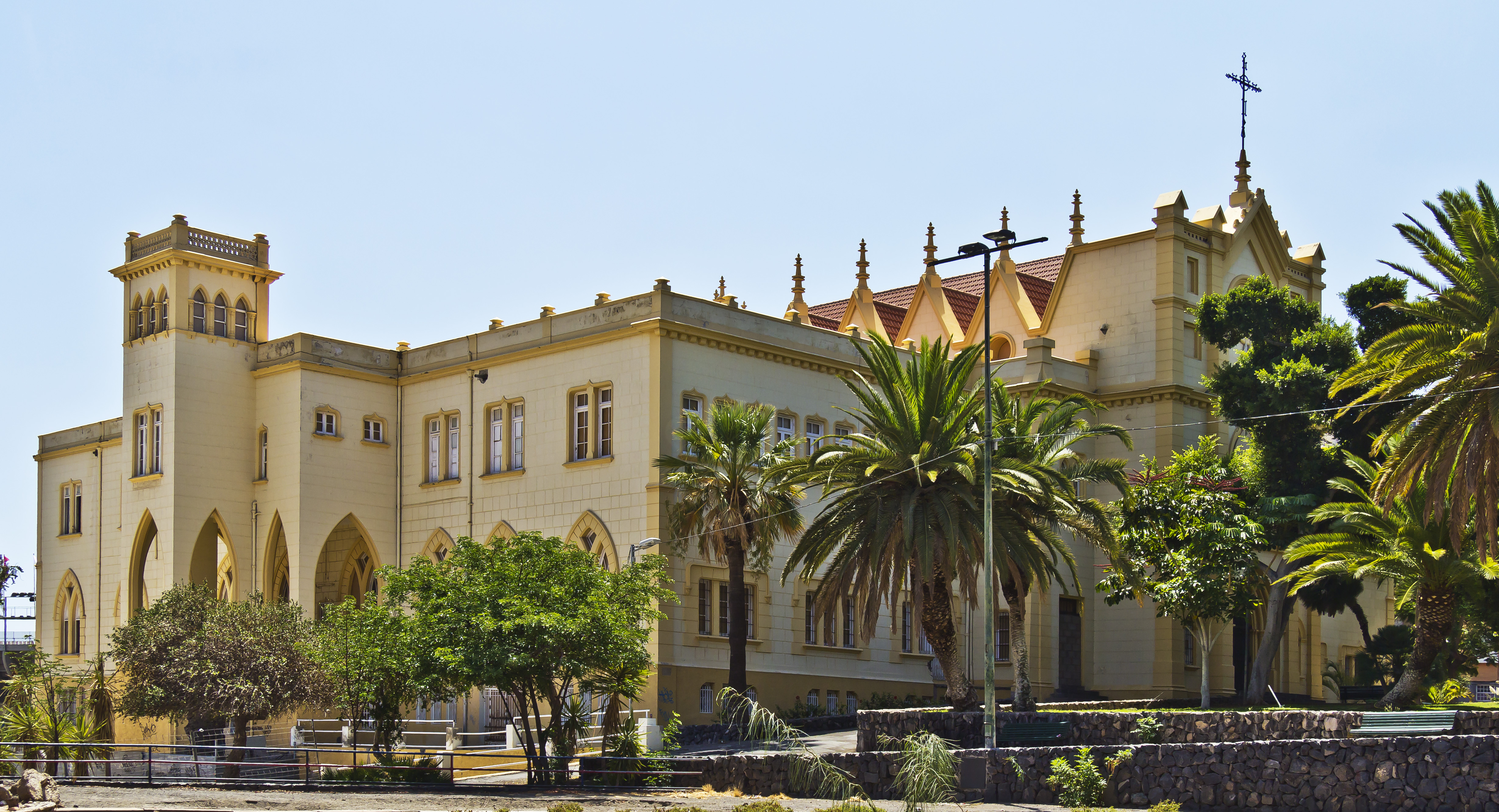 Das Colegio de la Asunción wurde 1905 von dem Architekten Mariano Estanga entworfen. Das heutige Aussehen erhielt das Gebäude nach Umbauten im Jahr 1921. Es befindet sich an der Calle San Sebastián in Santa Cruz de Tenerife.